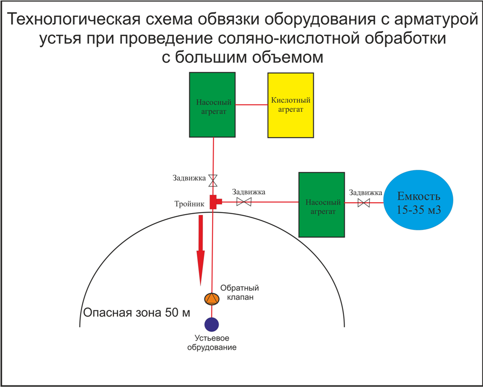 СКО с большим объемом